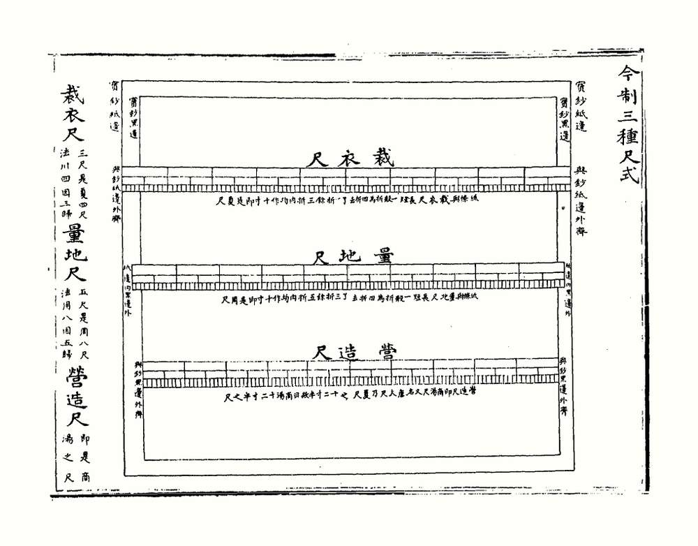 明代的三种尺